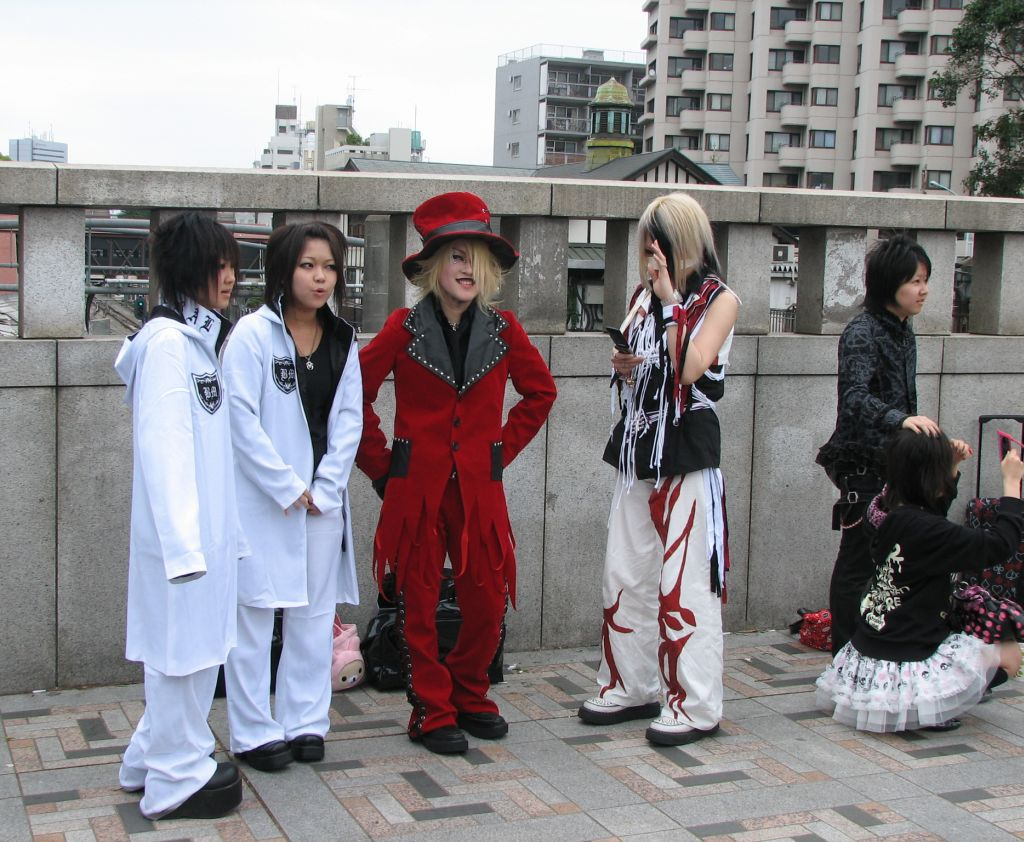 Pühapäevane cosplay Harajuku peatuse lähedal